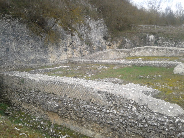 Il santuario di Lucus Angitiae